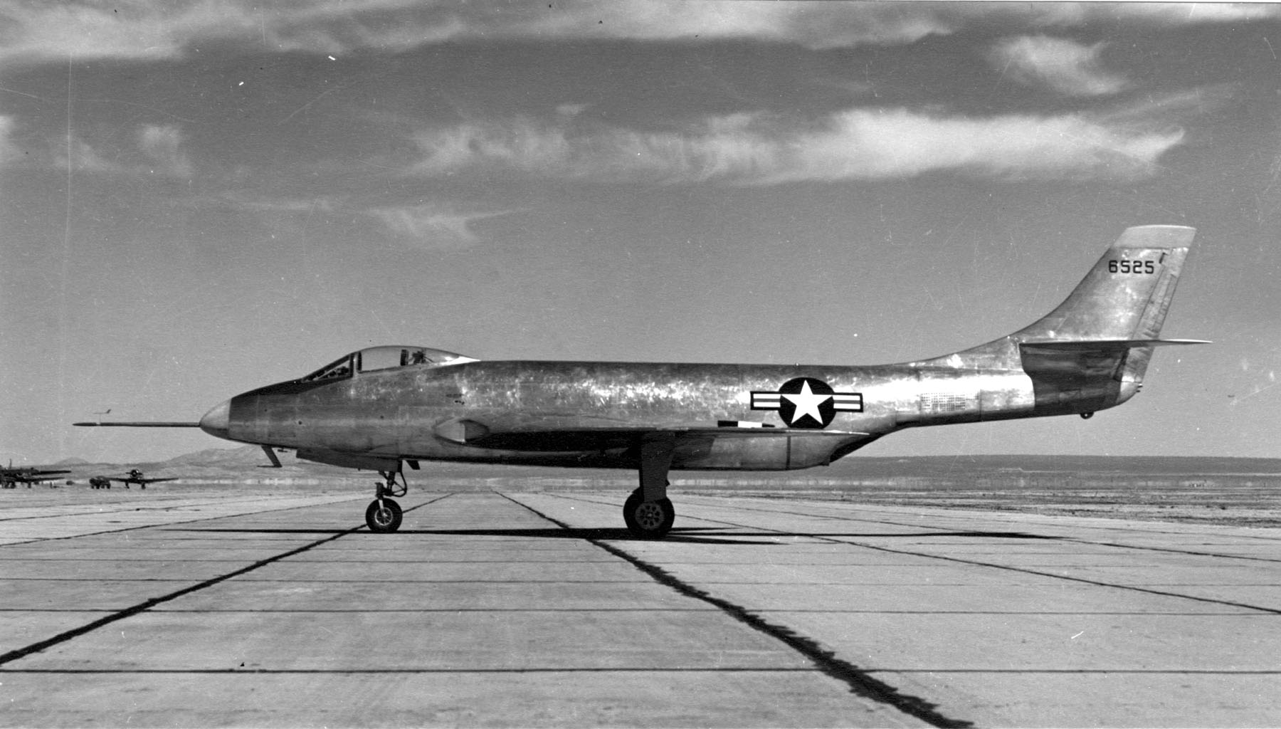 McDonnell XF-88 (SN 46-525)